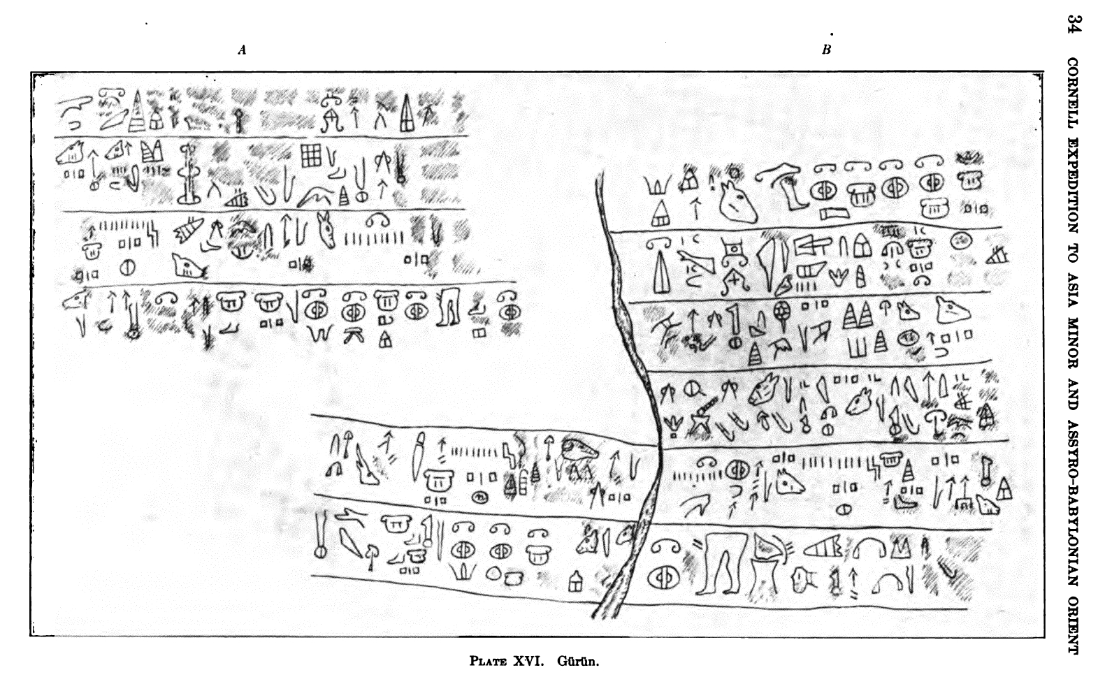 Umzeichnung der luwischen Felsinschriften von Gürün, Türkei, von einem Mitglied der Cornell-Expedition von 1907